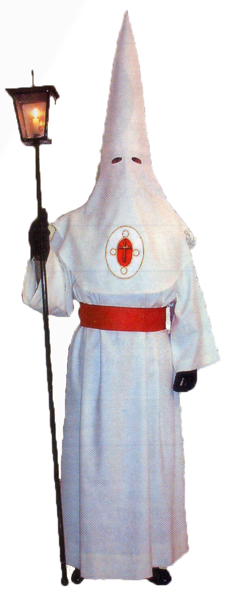 Hábito de la Hermandad de Cristo Rey de los Mártires de Ocaña (Toledo)